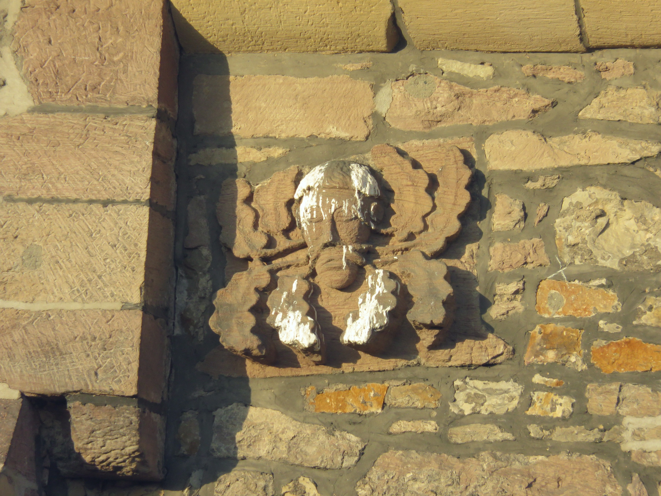 Blattmaske mit Eichenlaub an der Südwand der Evangelisch-lutherischen Kirche St. Marien in Lemgo